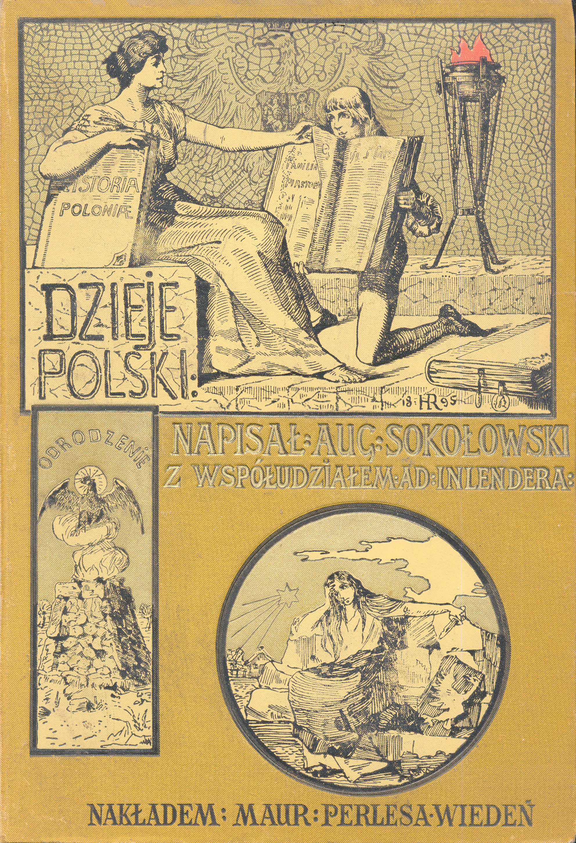 DZIEJE POLSKI ILLUSTROWANE. napisał Profesor Dr. August Sokołowski Z współudziałem Adolfa Inlendera z illustracyami Jana Matejki, Walerego Eljasza, Juliusza Kossaka, Henryka Rauchingera i innych artystów polskich. Tom III. Z 40 illustracyami. WIEDEŃ. Nakładem Maurycego Perlesa. 1898